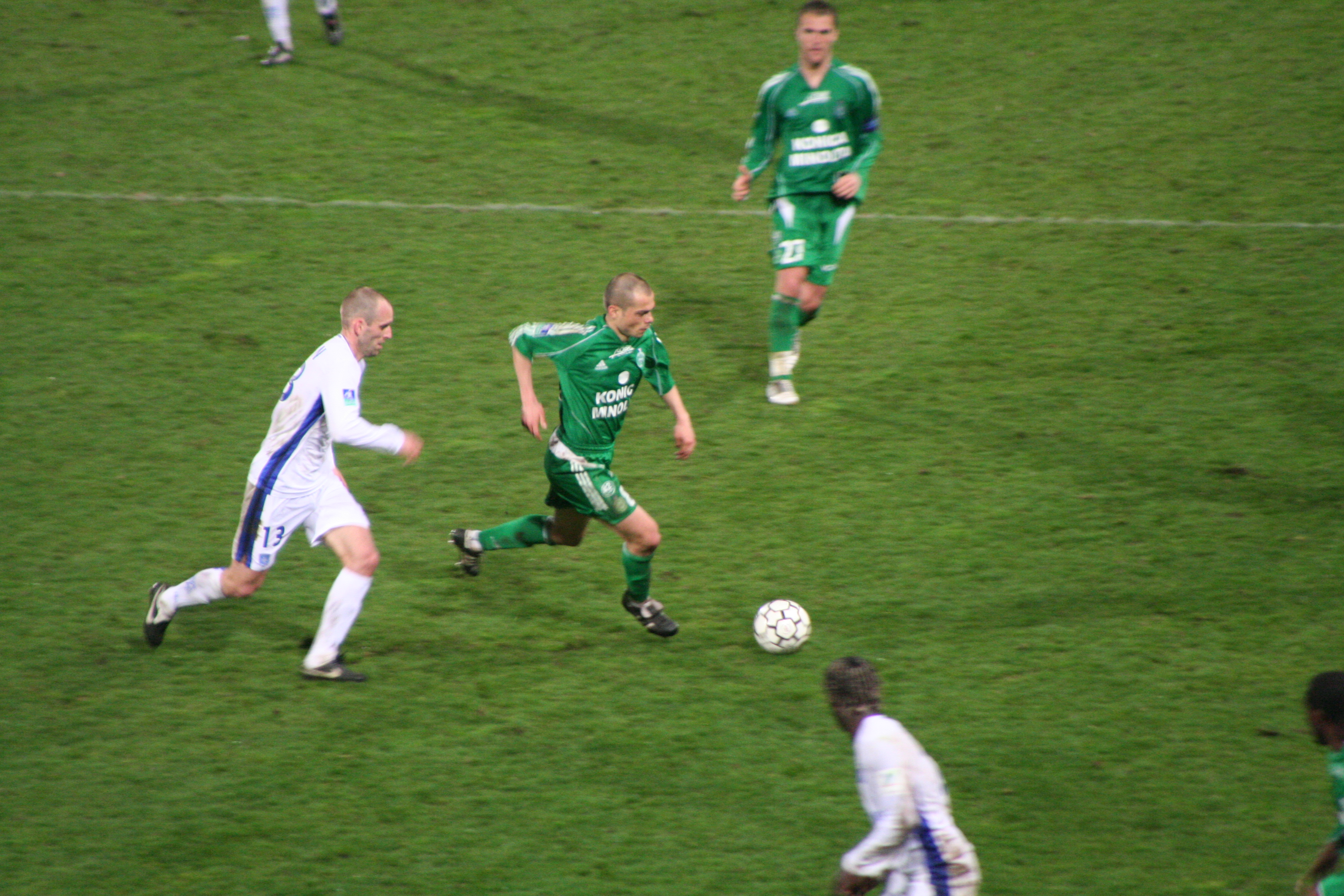 AJ Auxerre-Association sportive de Saint-Étienne Loire 2005-2006